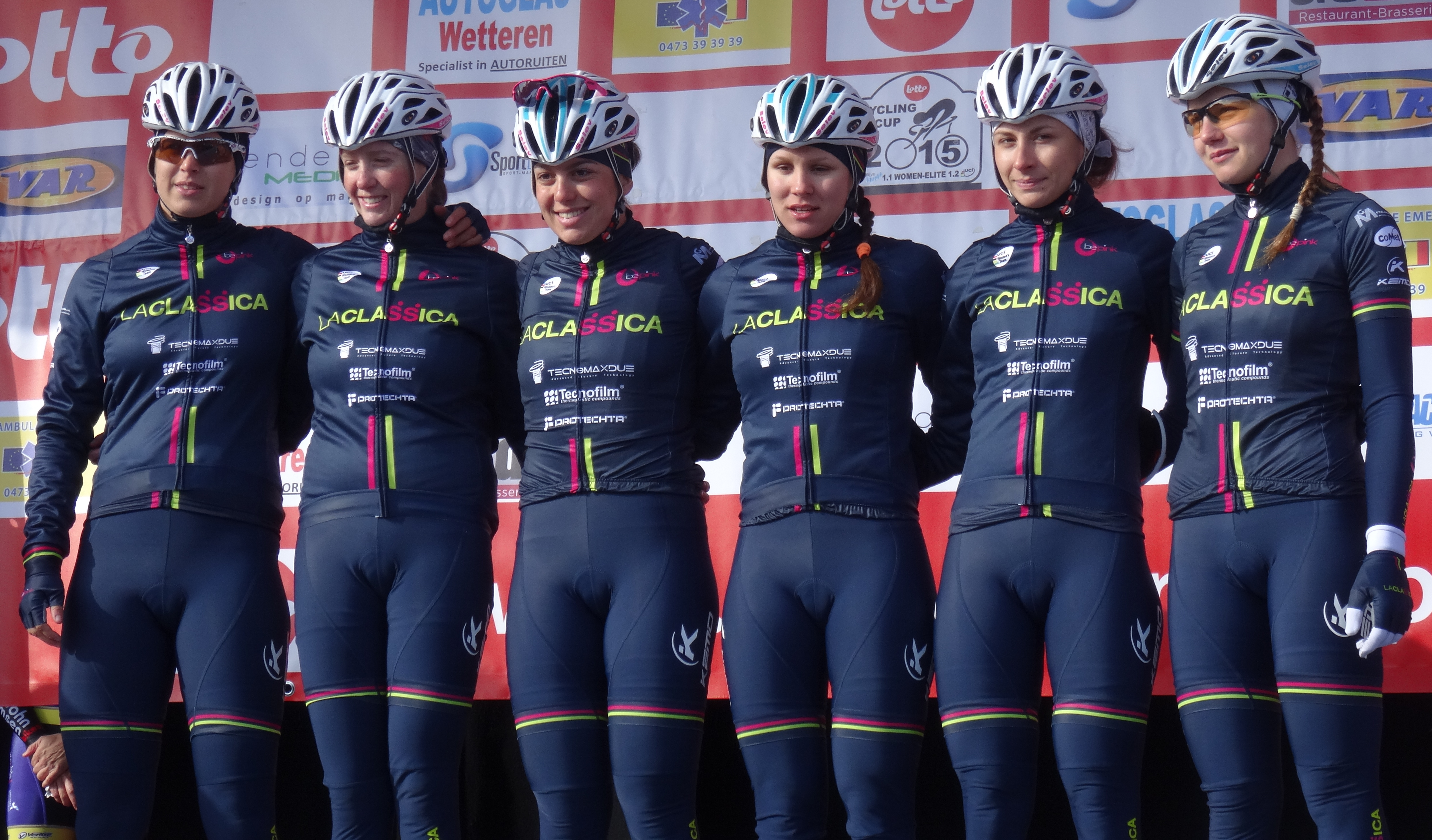 Reportage réalisé le mercredi 4 mars à l'occasion du départ du Samyn des Dames 2015 et du Samyn 2015 à Quaregnon, Belgique.